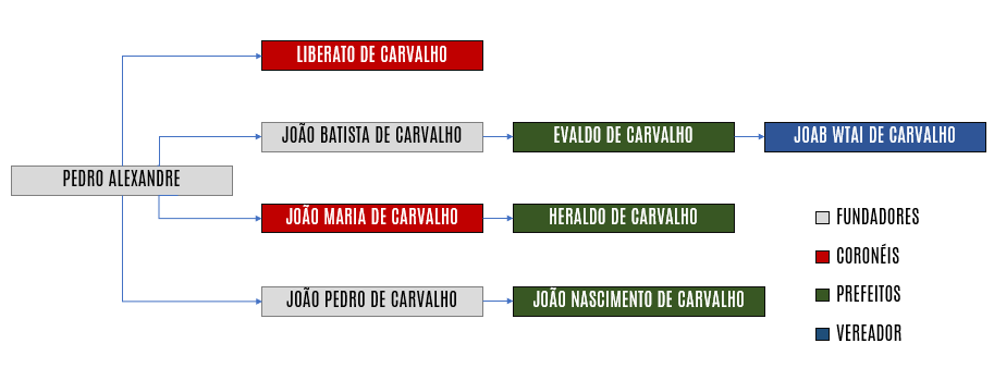 Árvore filogenética / política de gestores da Família Carvalho no município de Pedro Alexandre Bahia. Obra de Ricardo Lima.